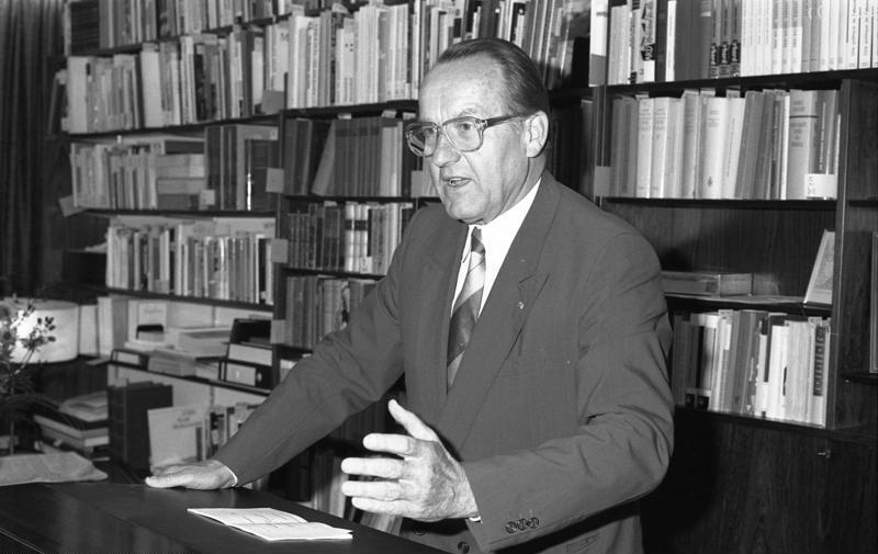 Der Staatssekretär im Bundesministerium für Wirtschaft, Dr. Otto Schlecht , überreicht dem Vorsitzenden der Ludwig-Erhard-Stiftung, Dr. Karl Hohmann, das Große Verdienstkreuz mit Stern des Verdienstordens der Bundesrepublik Deutschland - im Haus der Ludwig-Erhard-Stiftung.